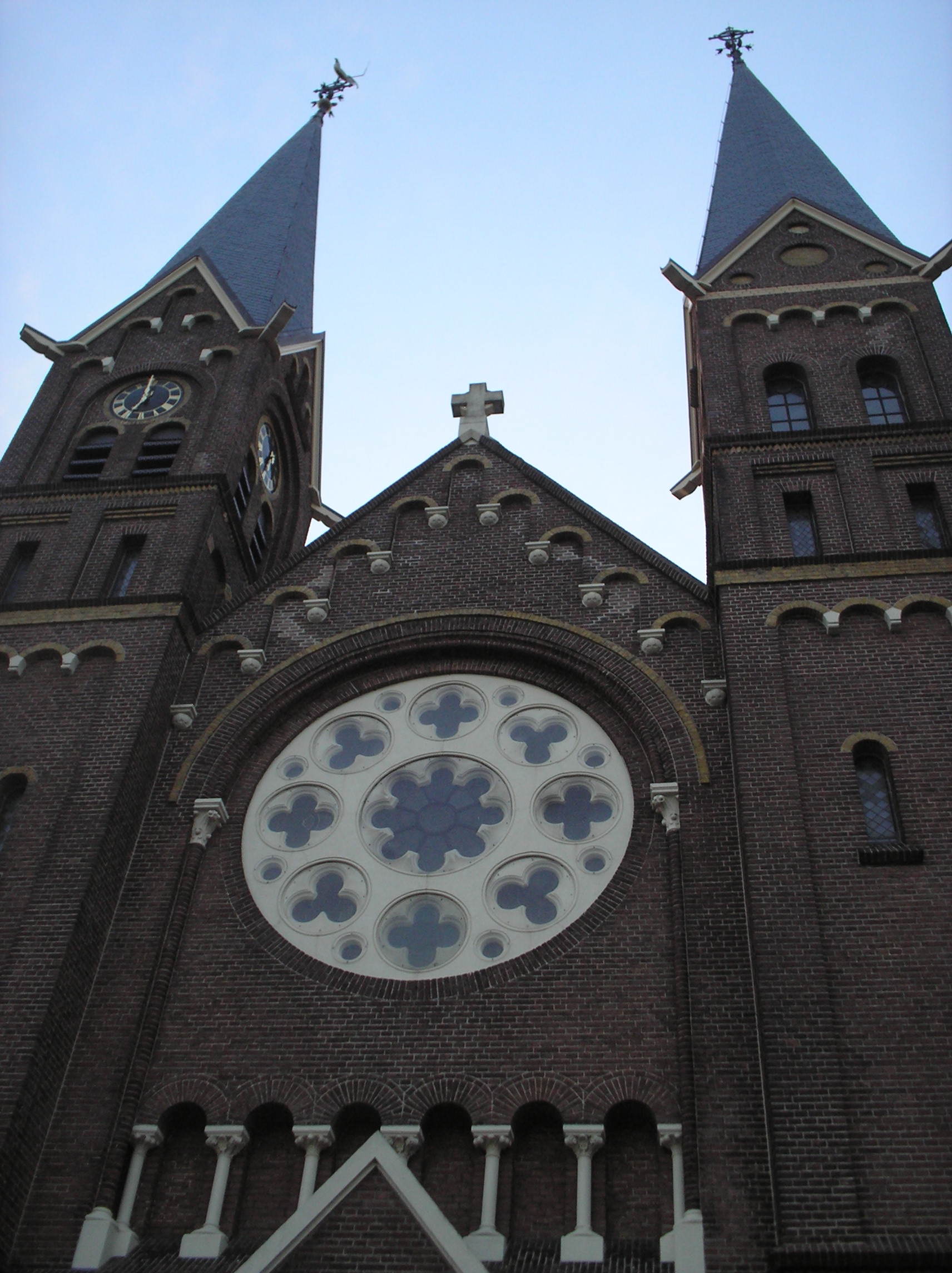 zelfgemaakte foto